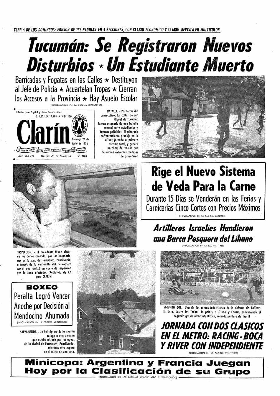 Es la tapa del Diario Clarin (Argentina) del día 25 de junio de 1972